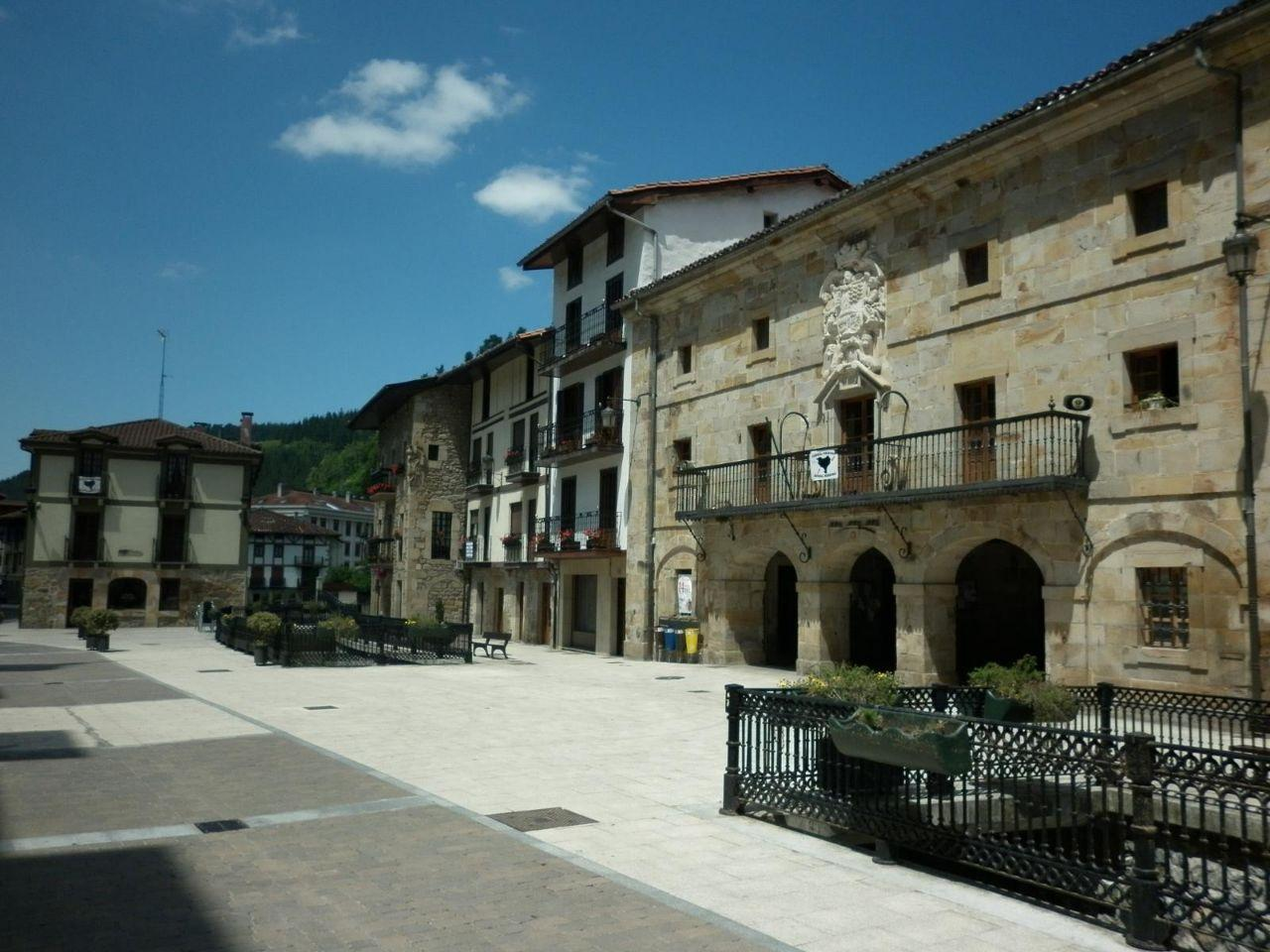 Antzuolako herriko plaza, eskuinean udaletxea ageri da.